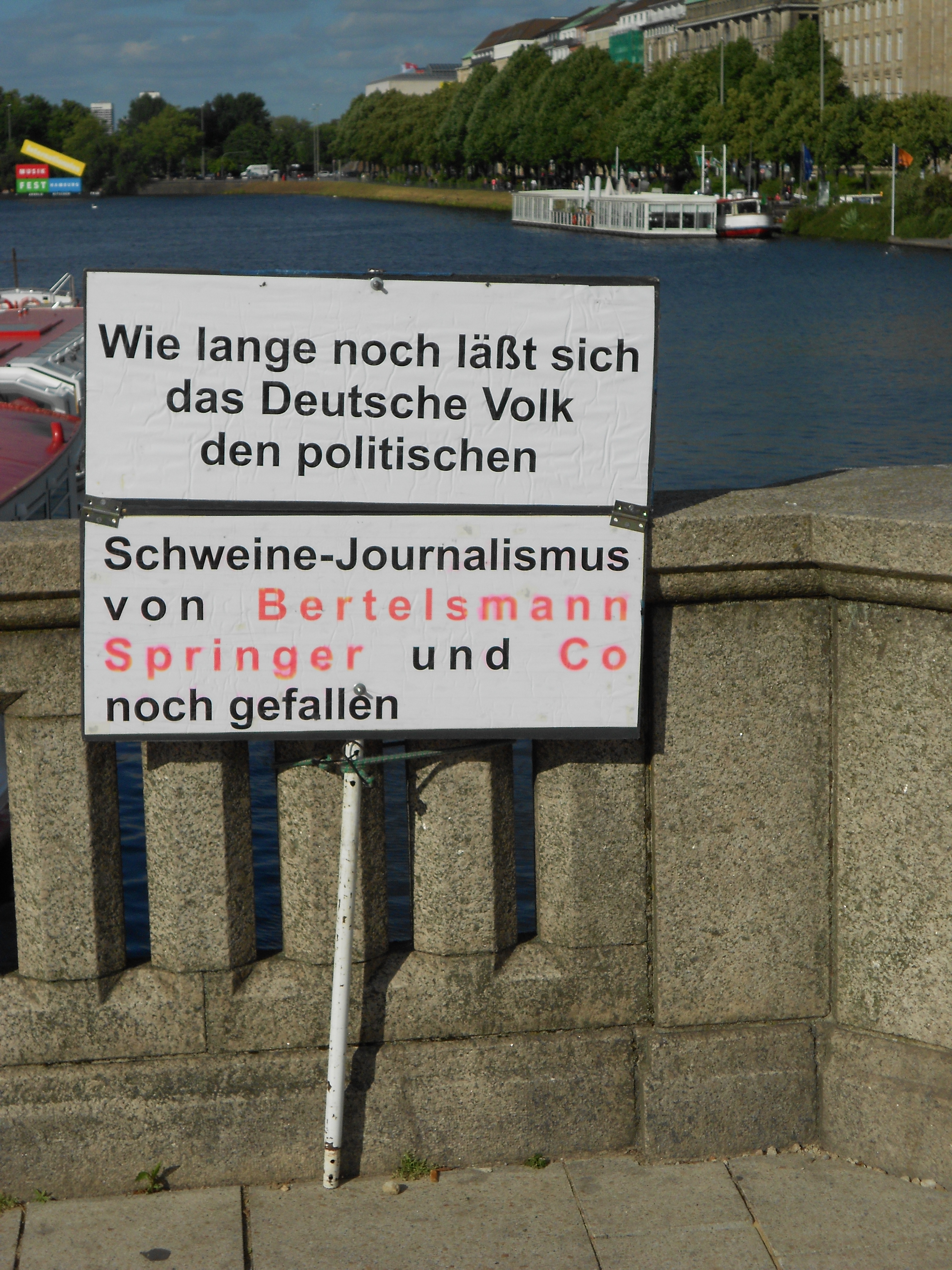 Protestschild am Rande der Mahnwache FÜR den Frieden / Montagsdemonstration, Hamburg, Jungfernstieg